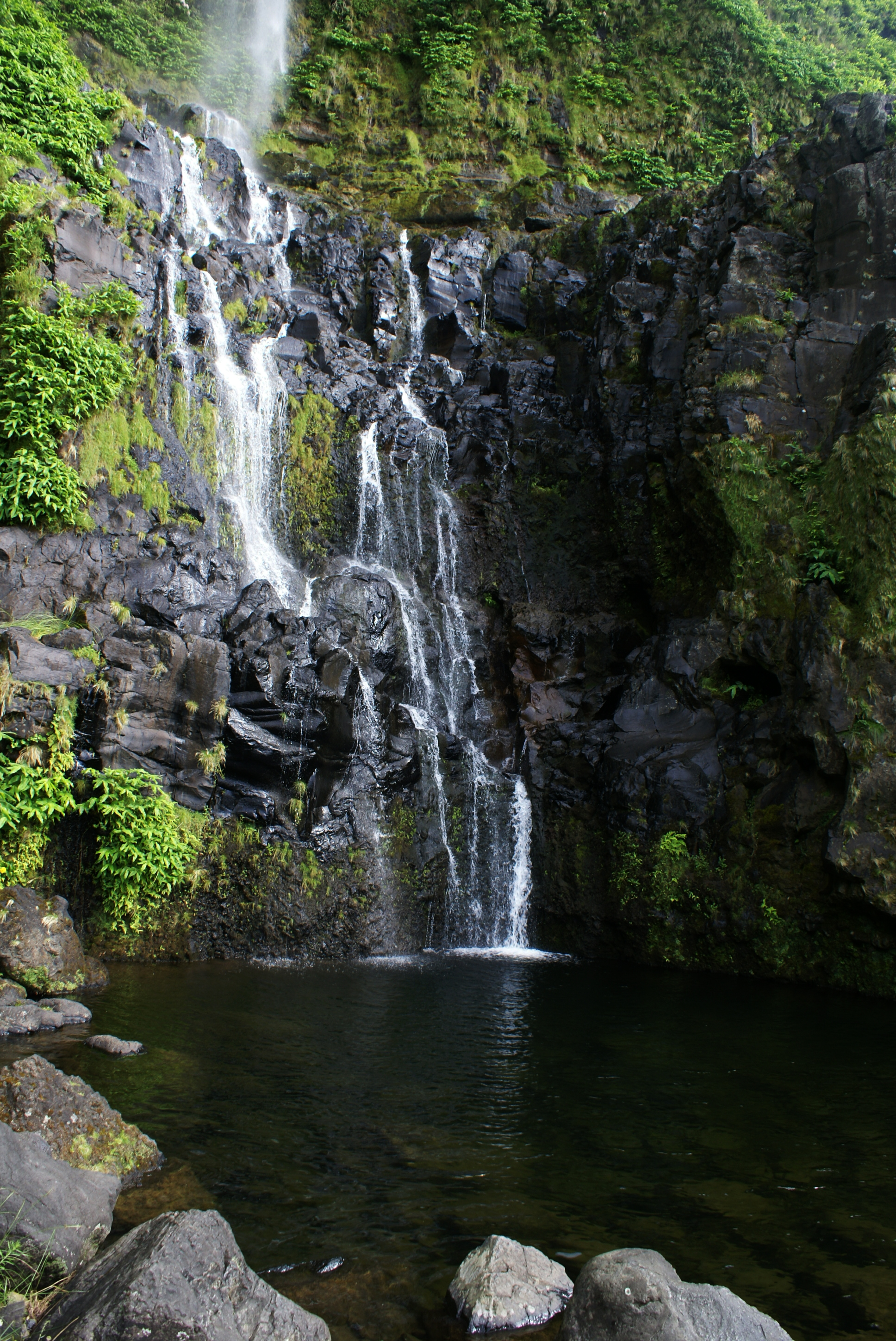 Cascata do Poço do Bacalhau, Fajã Grande, Arquivo de Villa Maria, ilha Terceira, Açores